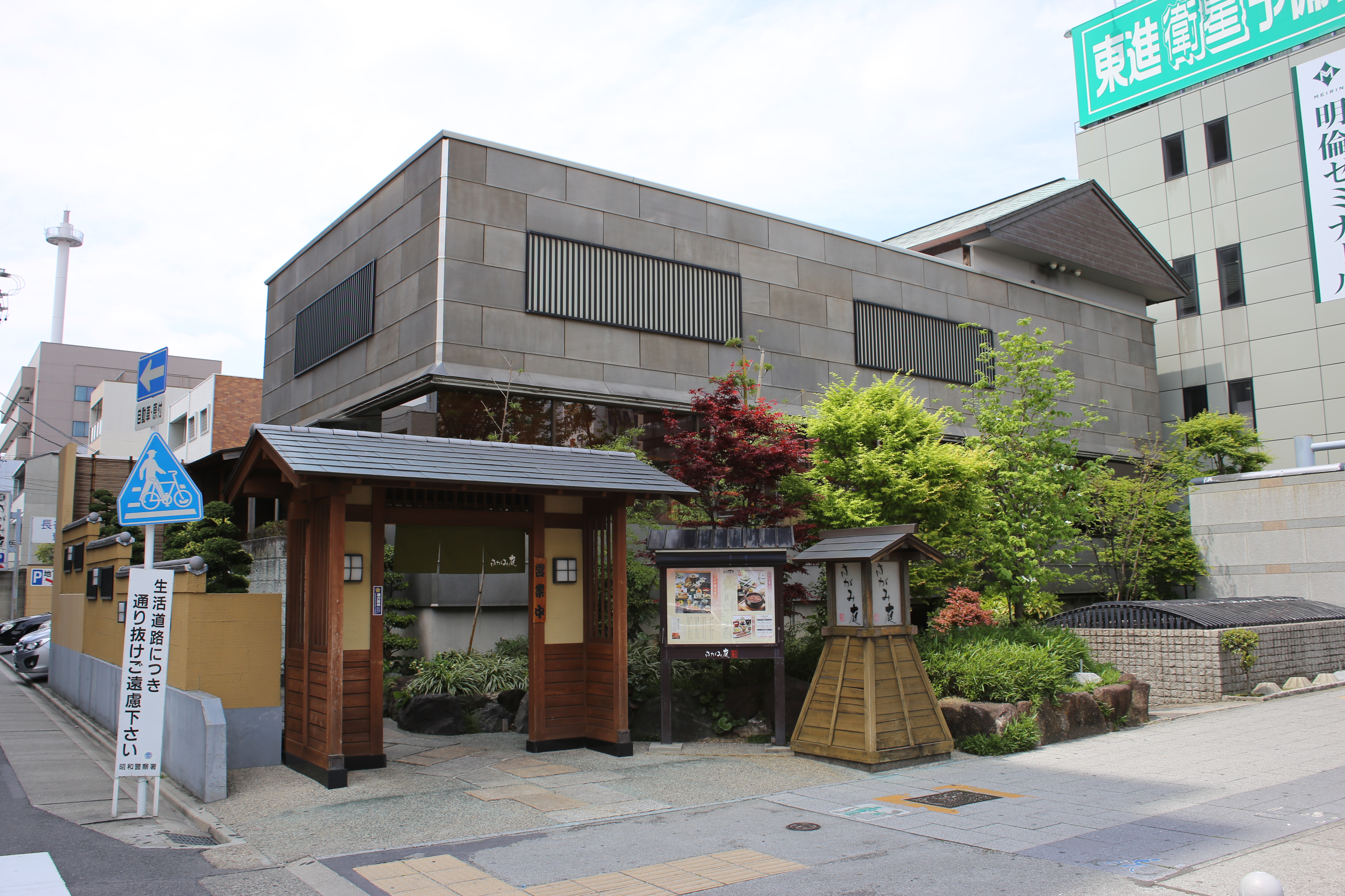 名古屋市昭和区阿由知通4丁目のさがみ庭御器所店を東側公道南側より撮影